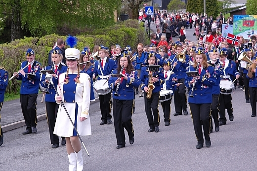 Heggedal og Blakstad skolekorps - 17. mai 2012